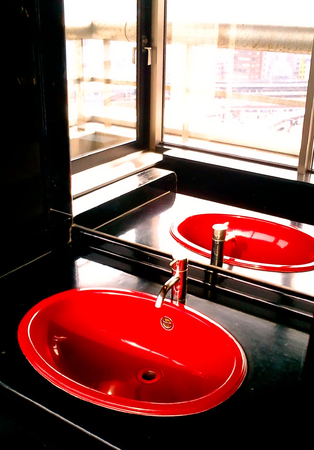 Sink (Kobe_Harbor_Land)